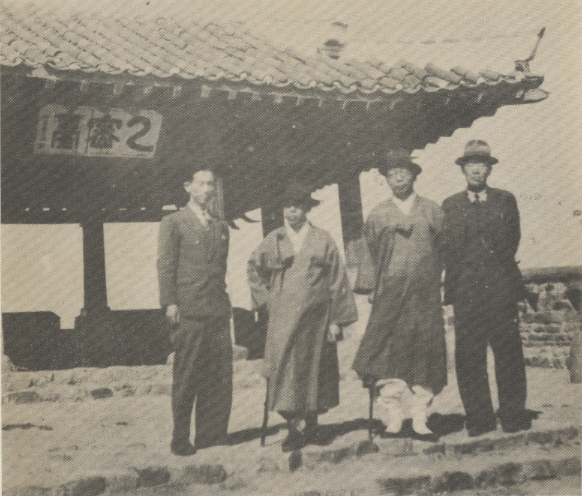 선우진 김규식 김구 원세훈(1948.04.10), 평양 을밀대